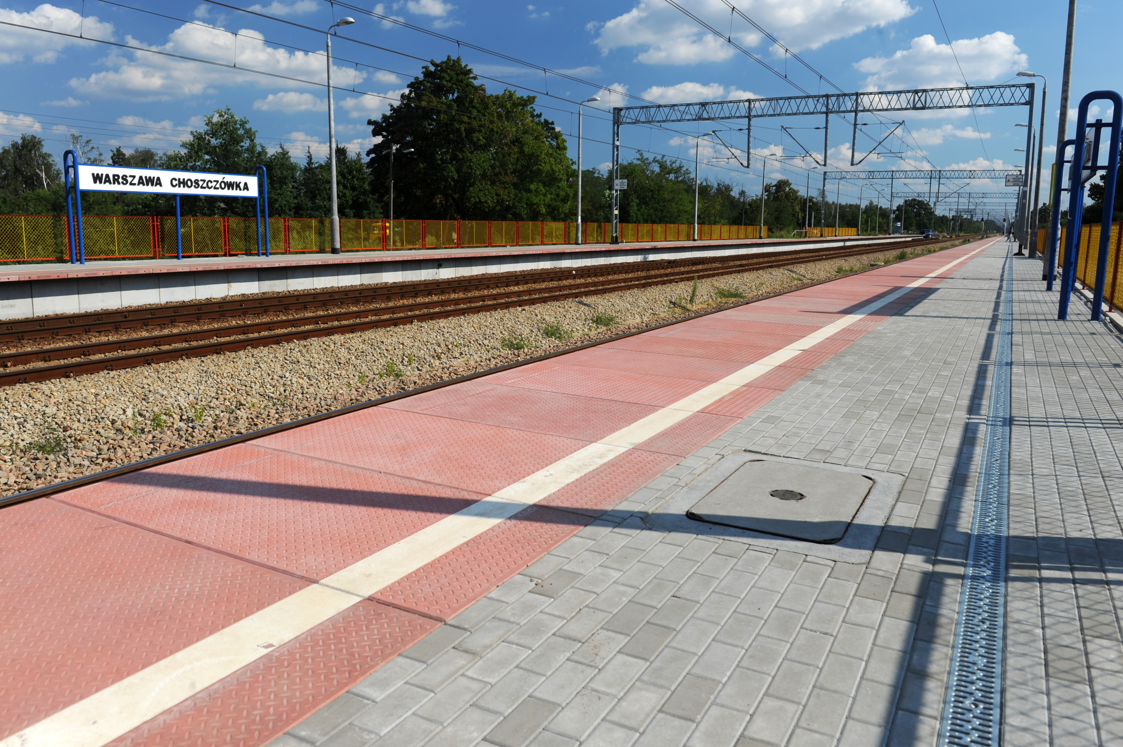 Stacja kolejowa Warszawa Choszczówka.